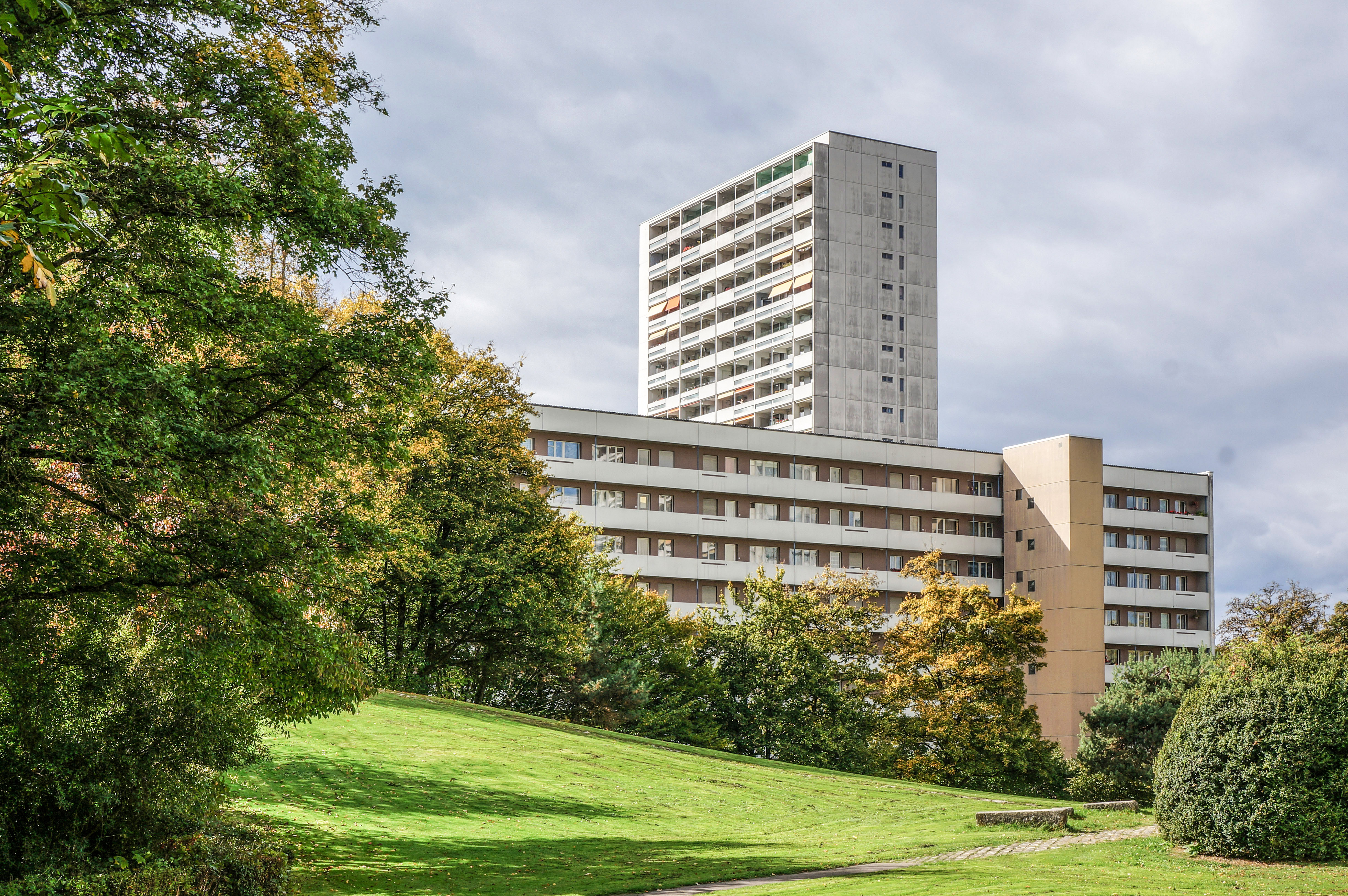 Überbauung Tscharnergut, Aussenraum mit Schlittelhügel im Vordergrund, Scheibenhaus und Hochhaus im Hintergrund, Juni 2017.